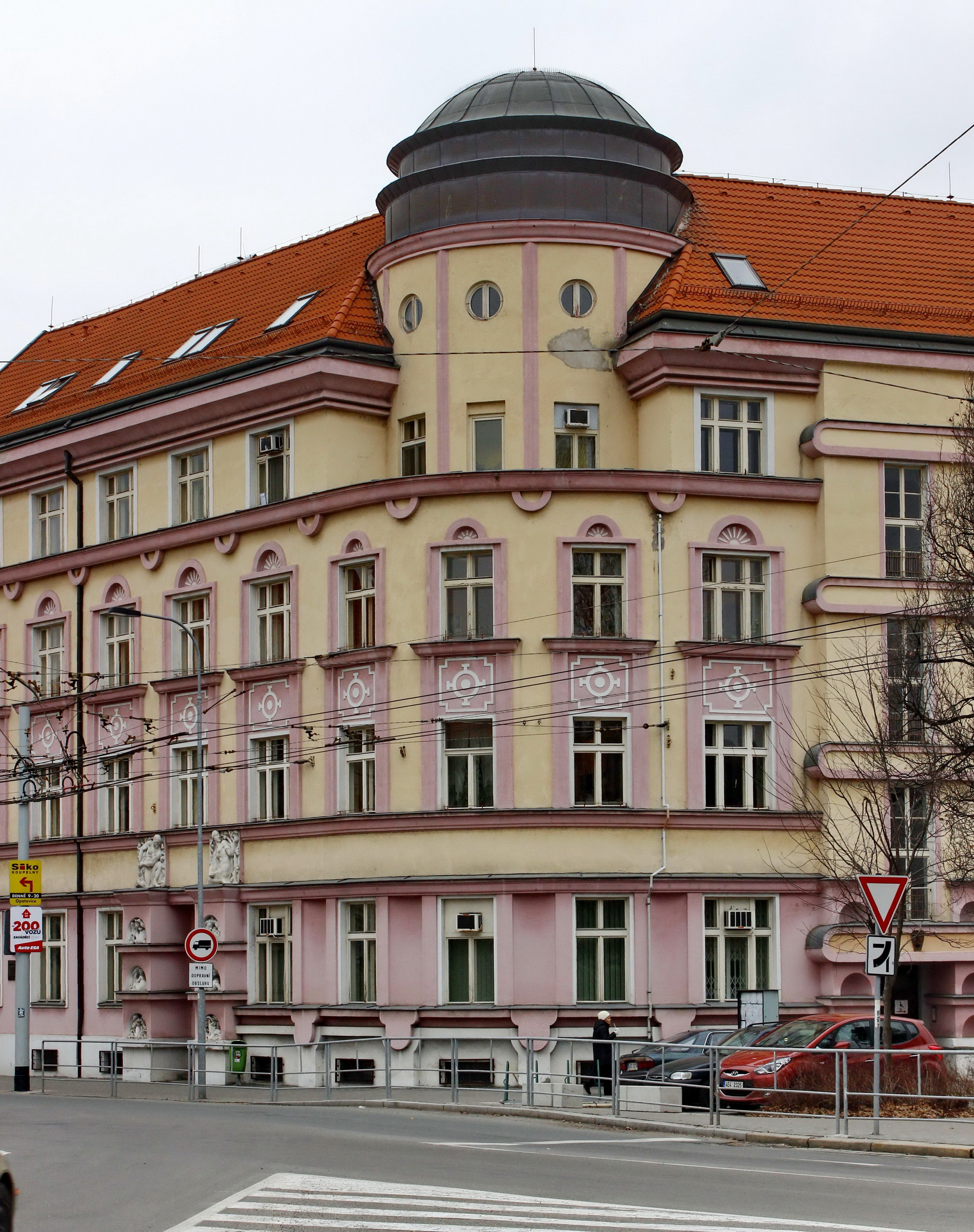 Oldřich Liska: Dům Charlotty Masarykové (Sociální dům Ligy proti tuberkulóze), Pardubice, Bílé předměstí čp. 44, Štrossova / Sezemická